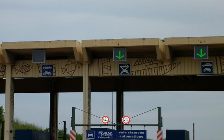 Péage de Nouvelle-Calédonie avec des motifs kanaks